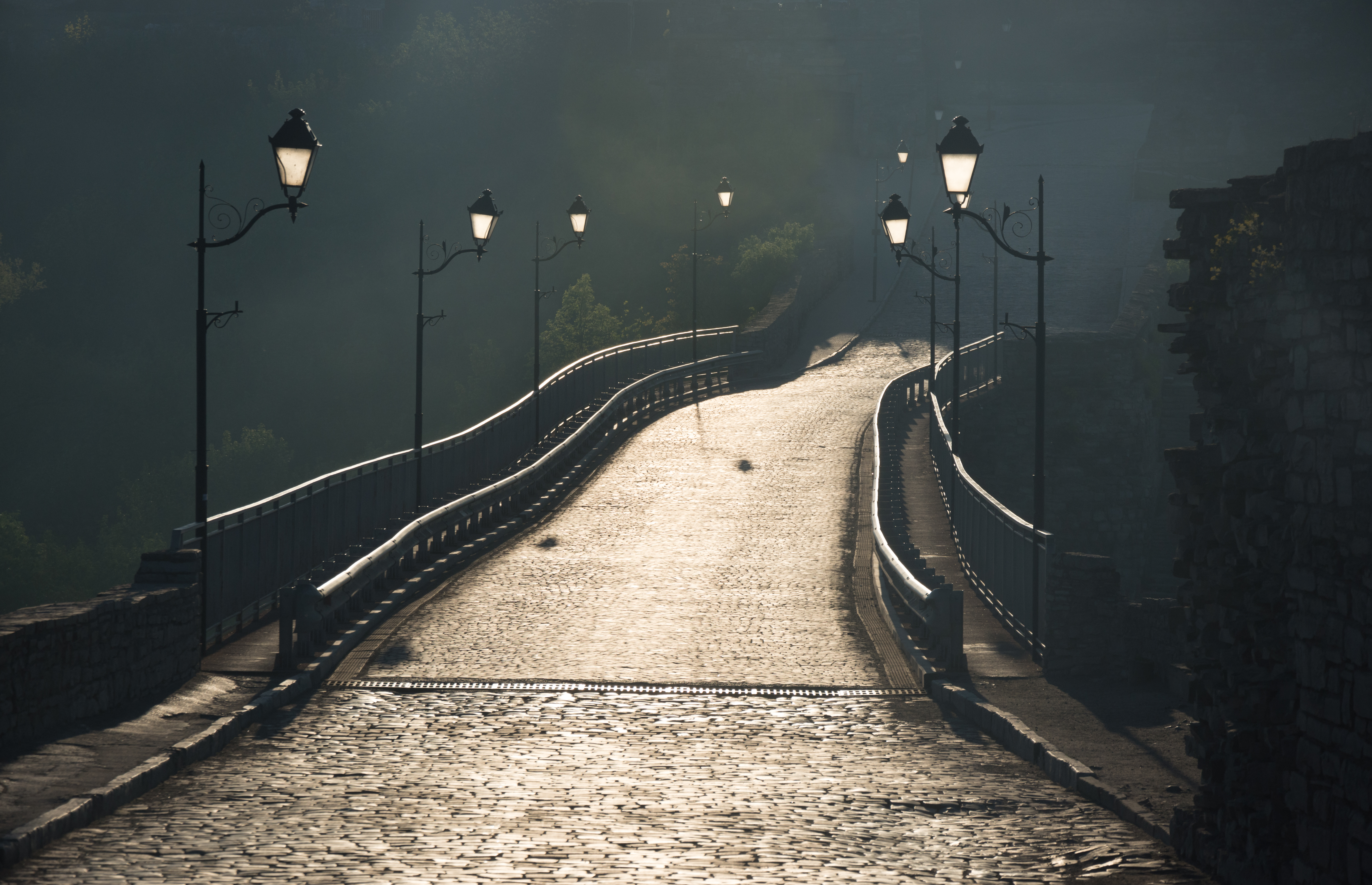 Кріпосний міст (Замковий міст), Кам'янець-Подільський, вул. Замкова